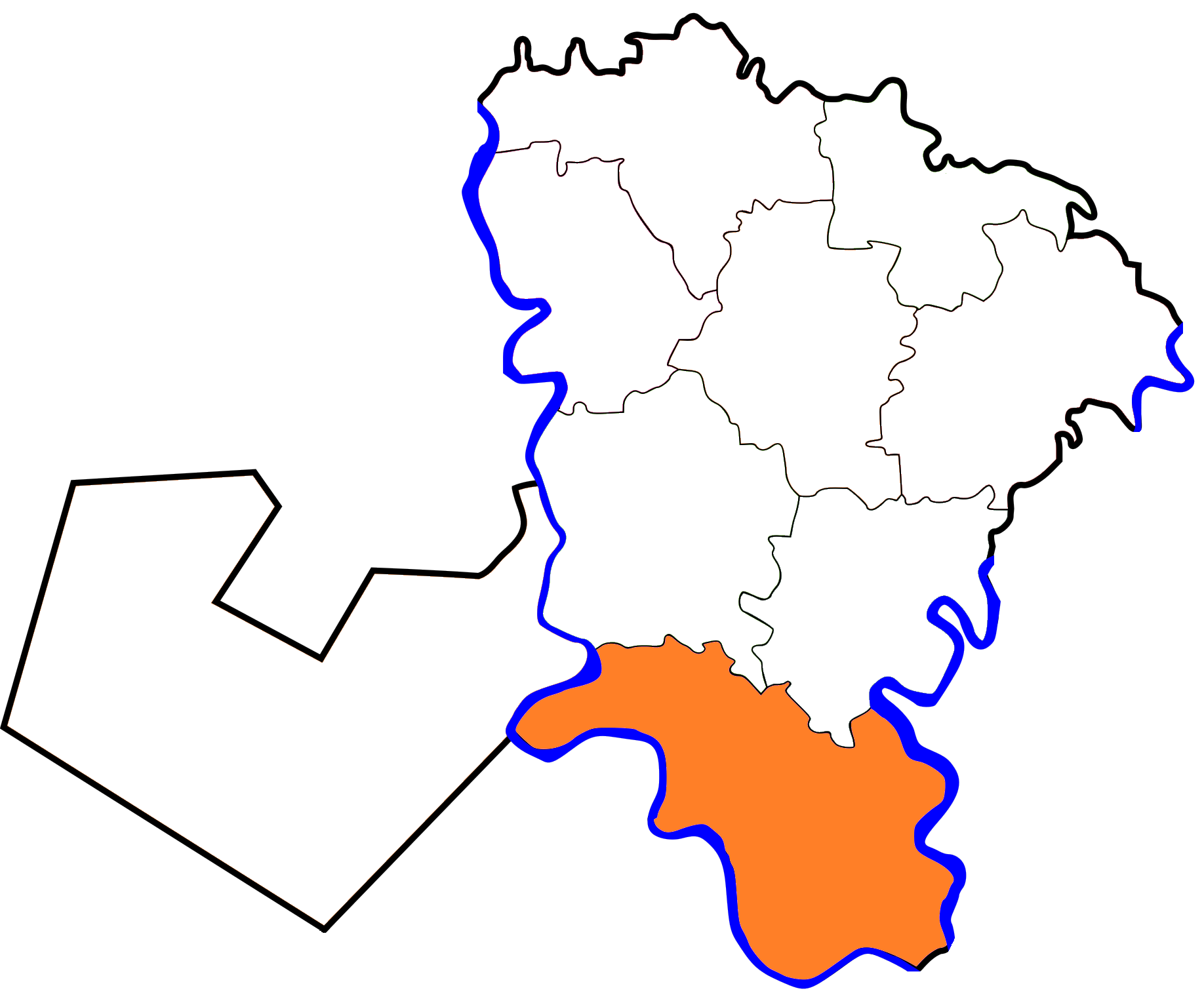 خريطة مركز أشمون بالنسبة لمحافظة المنوفية، مصر.